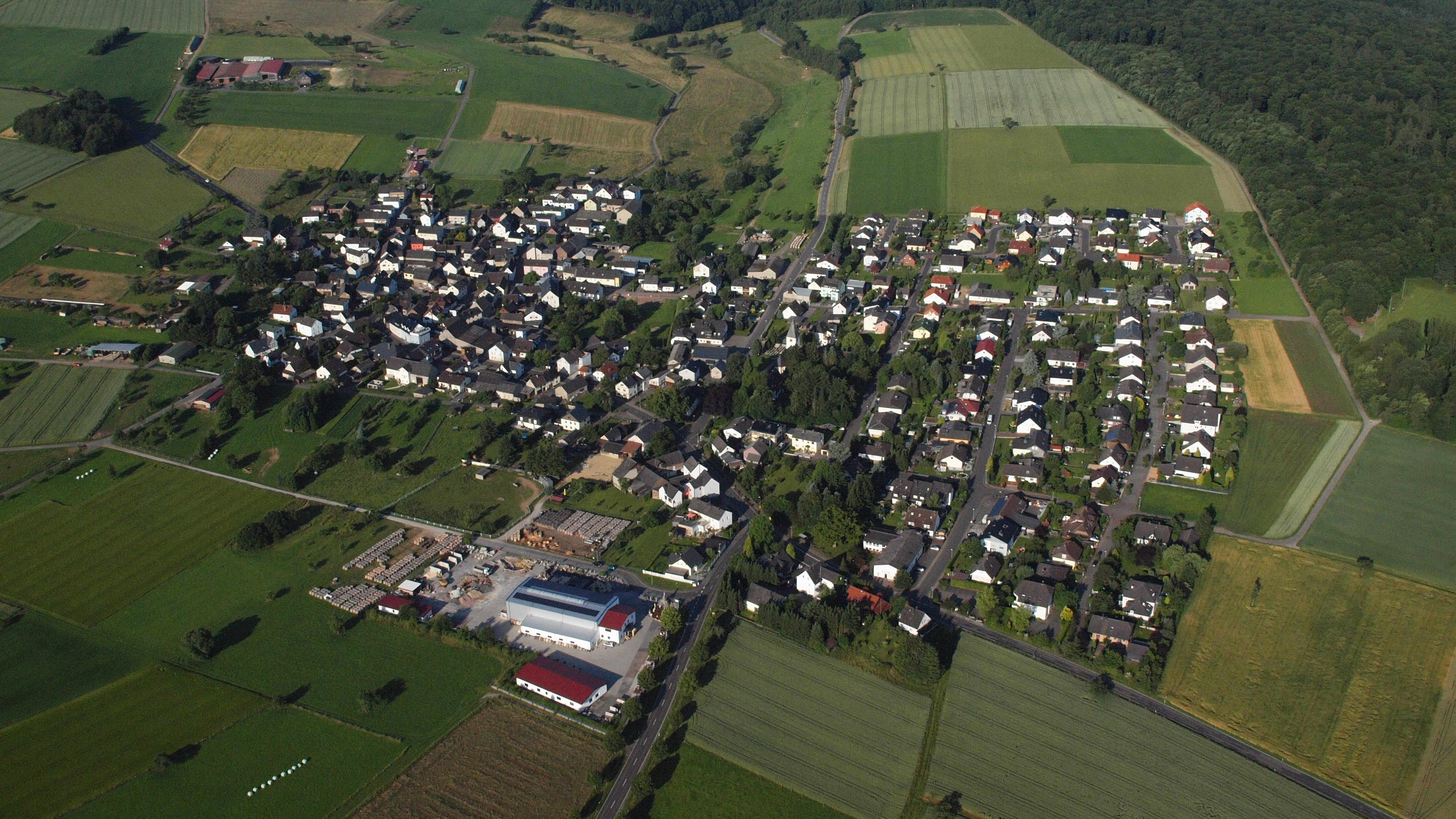 Eppenrod: Luftaufnahme aus östlicher Richtung